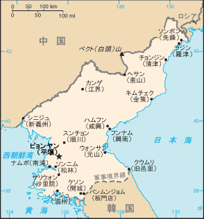 北朝鮮の地図 (日本語)、PDのCIA The World Factbookのファイルを日本語化。